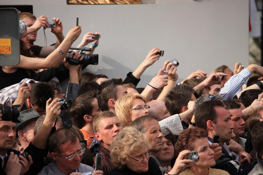 Pogrzeb pary prezydenckiej.